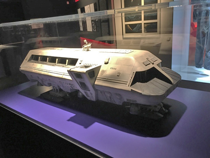 Moonbus Modell aus dem Film 2001 Odyssey im Weltraum